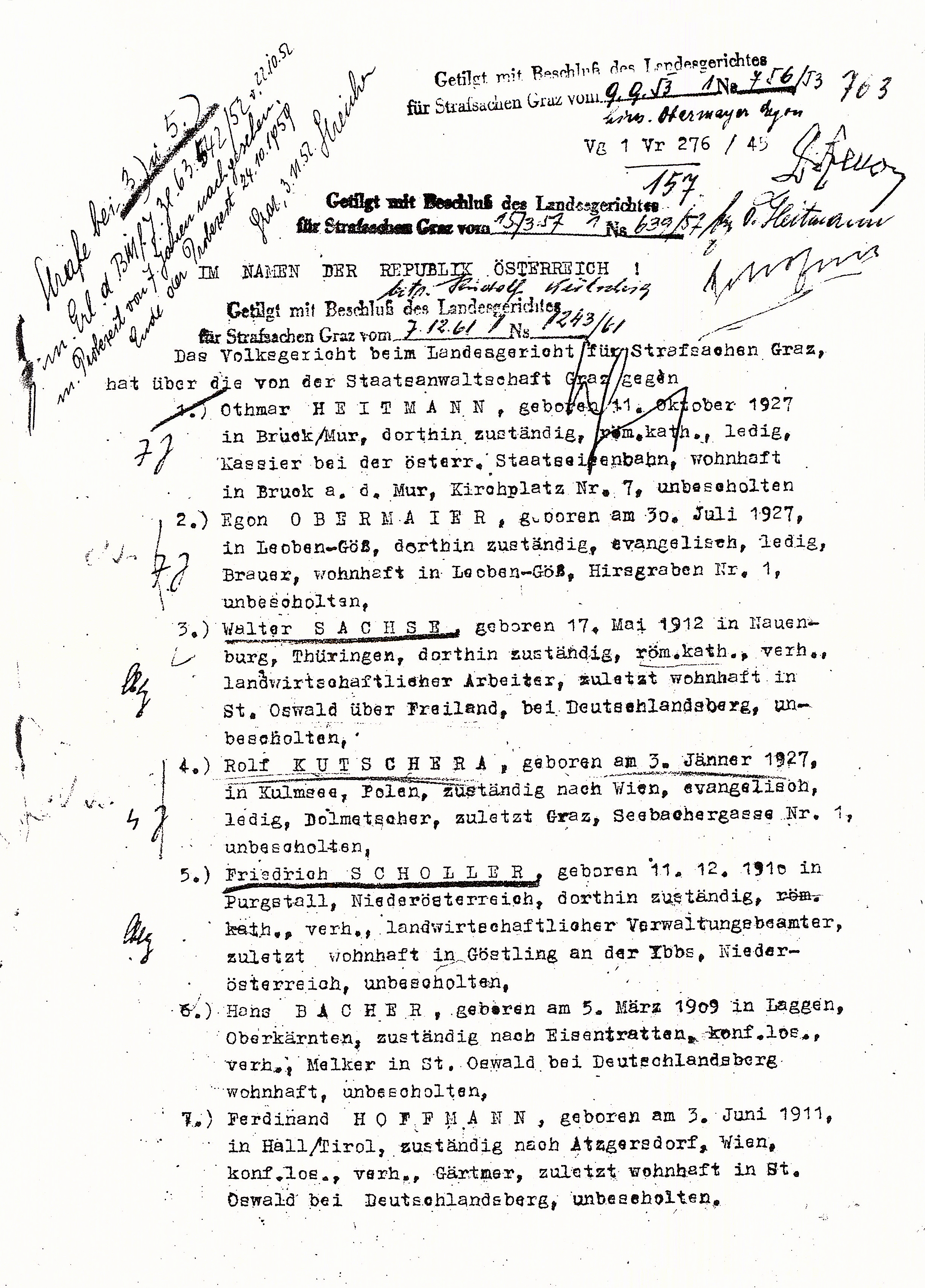 Urteil im "Grazer Partisanenmordprozess" vor dem Volksgericht beim Landesgericht Graz, Österreich vom 26. September 1946, Aktenzahl Vg 1 Vr 276/45, Seite 1 Quelle für den Scan 2015: Wolfgang Neugebauer: Die Koralmpartisanen (Kampfgruppe Steiermark). In: Brigitte Bailer-Galanda (Hrsg.): Österreich 1938-1945. Loseblattausgabe im Abonnement. Archiv Verlag. Wien 2006. Dokument 4: Wiedergabe der Archivquelle DÖW 21 829/10. (DÖW = Dokumentationsarchiv des österreichischen Widerstandes) Freies Werk, amtliches Werk der Republik Österreich. Personennamen, die nicht in der allgemeinen Literatur zu diesem Urteil ohnedies genannt sind, wurden gelöscht.